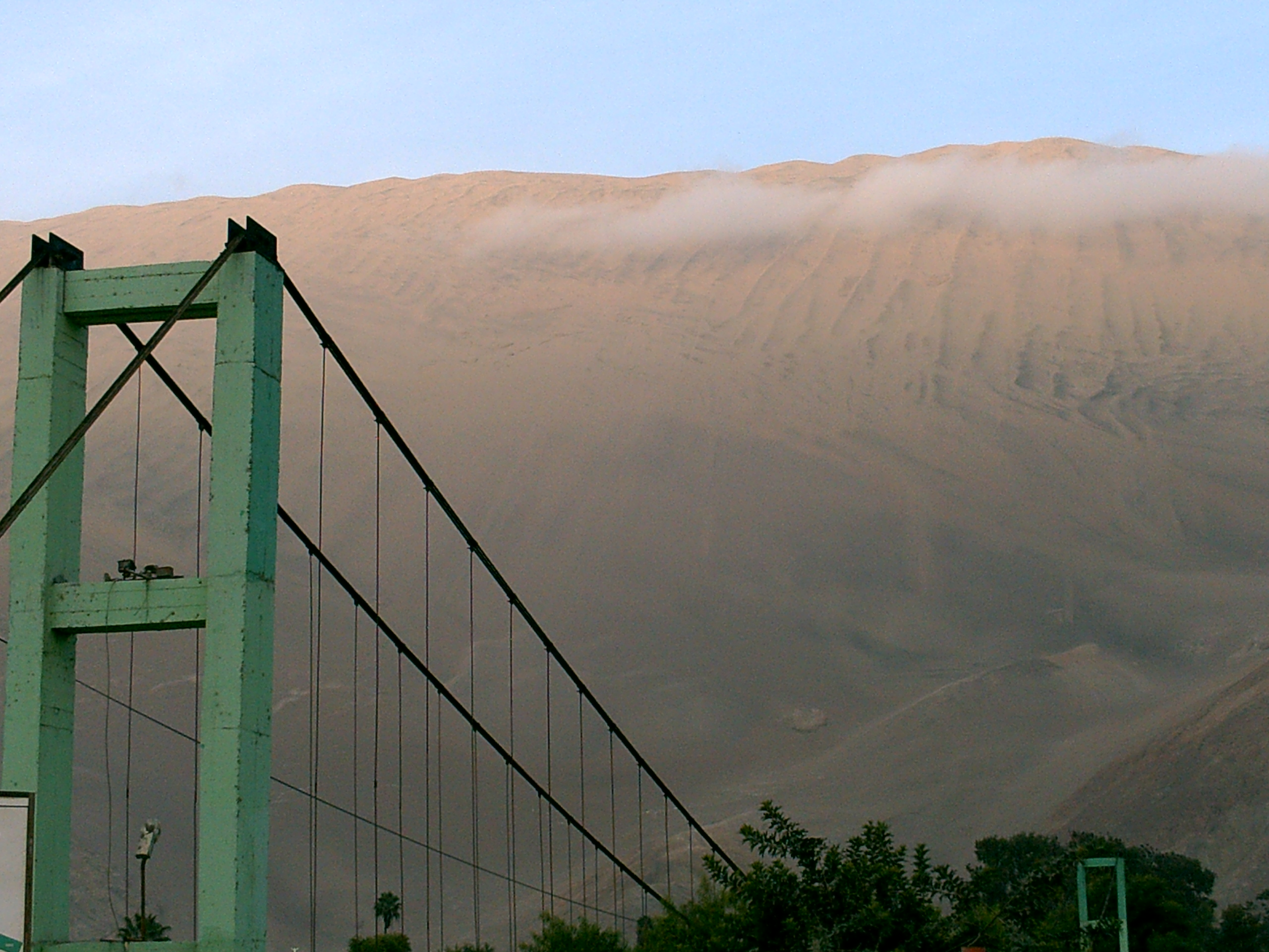 Abismos de Acari - Sandboarding de Hawaii.